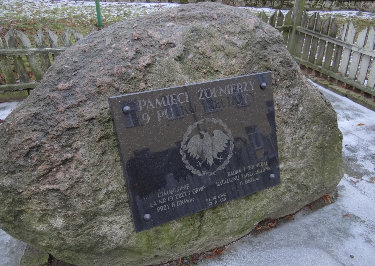 Pamiątka upamiętniająca żołnierzy 9 pułku